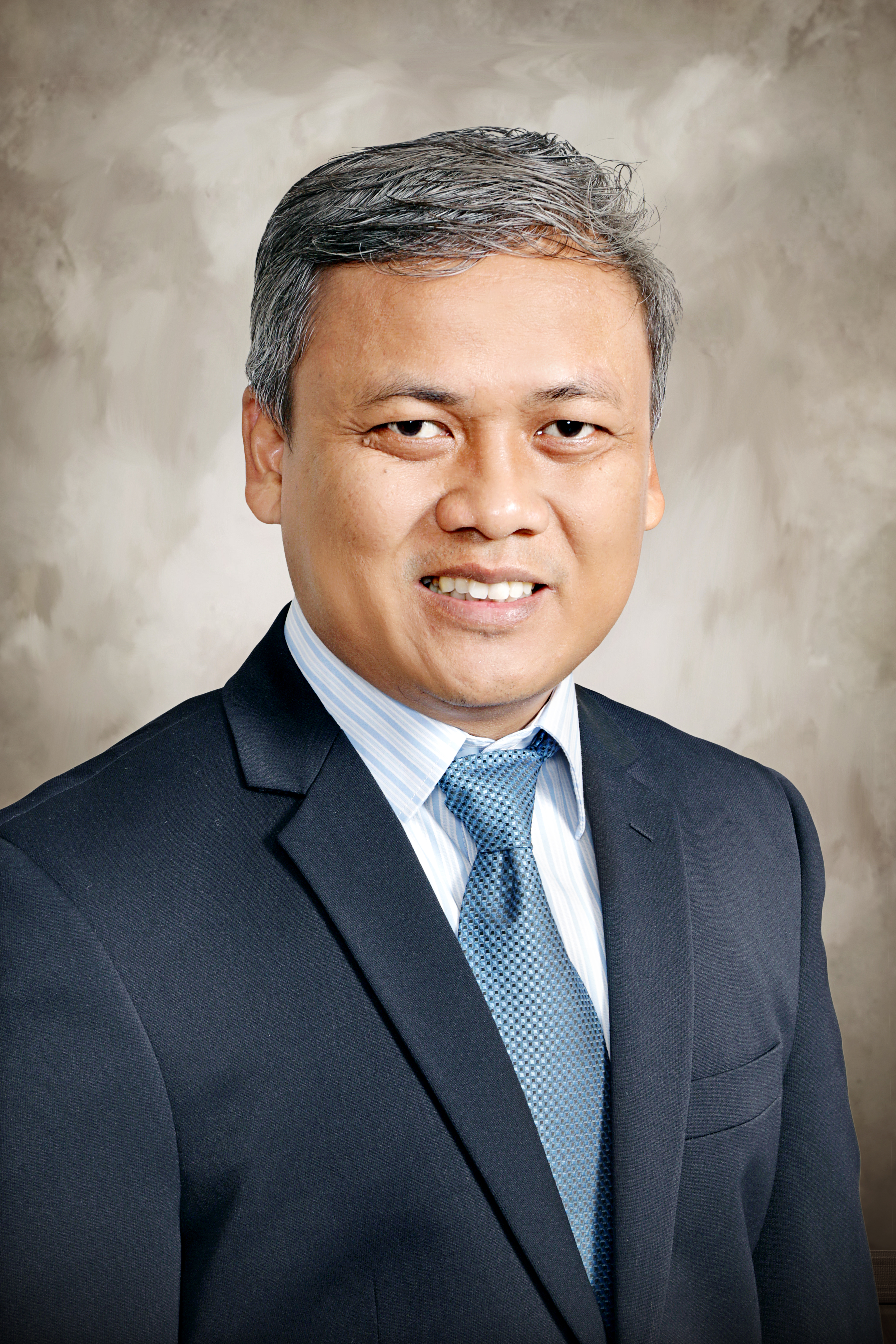 Prof. Dr. H. Adiwijaya, S.Si., M.Si. Majalengka, 21 September 1974 Rektor Universitas Telkom